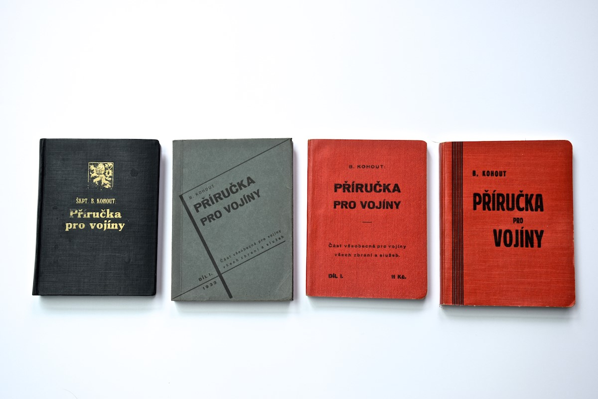 Rúzné vydání